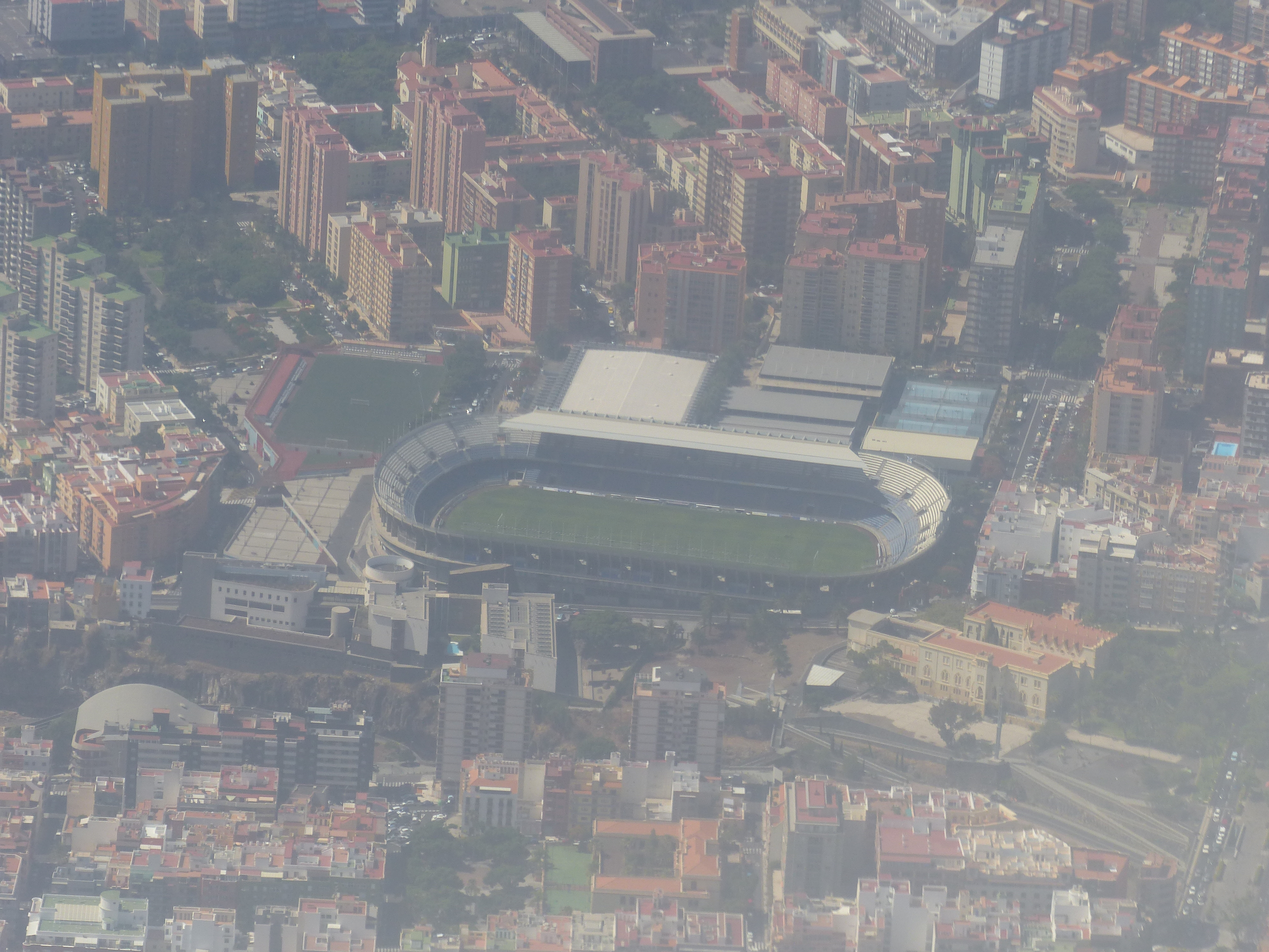 Estadio de Tenerife desde el aire, España, 2015